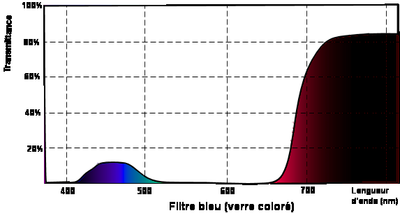 Ce schéma représente un exemple de courbe de la transmittance d'un verre coloré, de couleur bleue en fonction de la longueur d'onde. Il permet d'illustrer la notion de filtre en optique. Catégorie:Schéma de physique